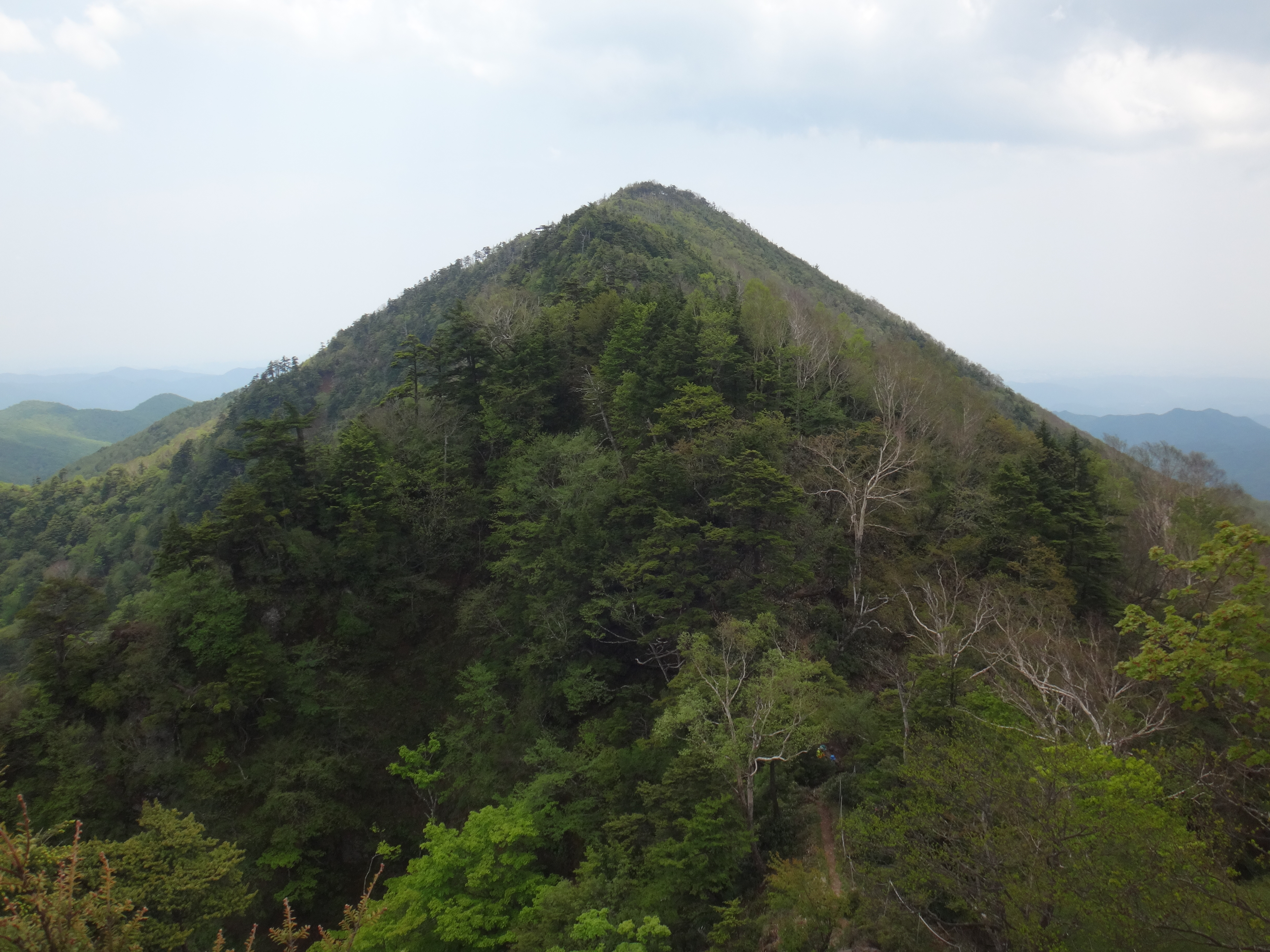 後袈裟丸山から見た前袈裟丸山